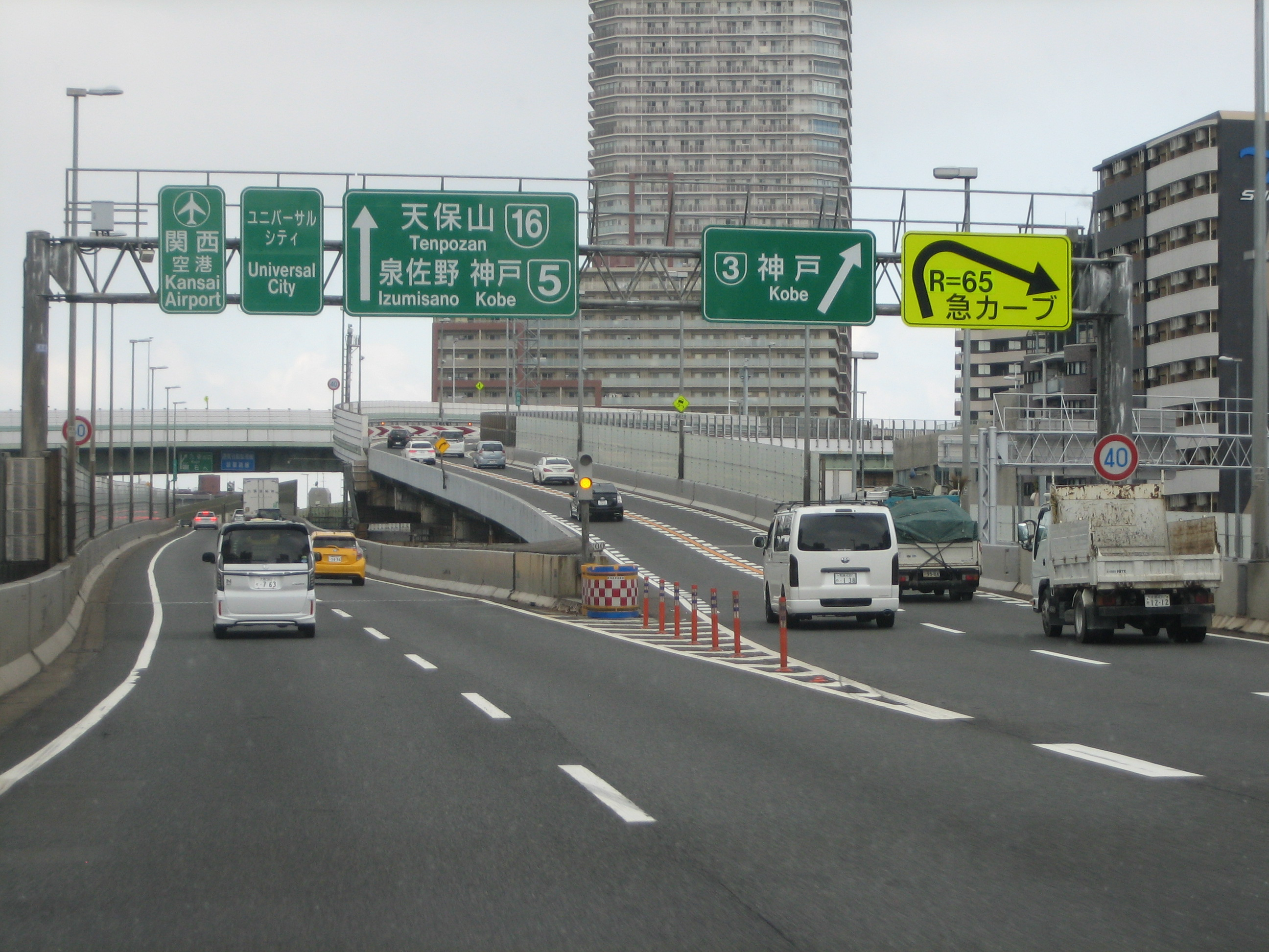 阿波座JCT